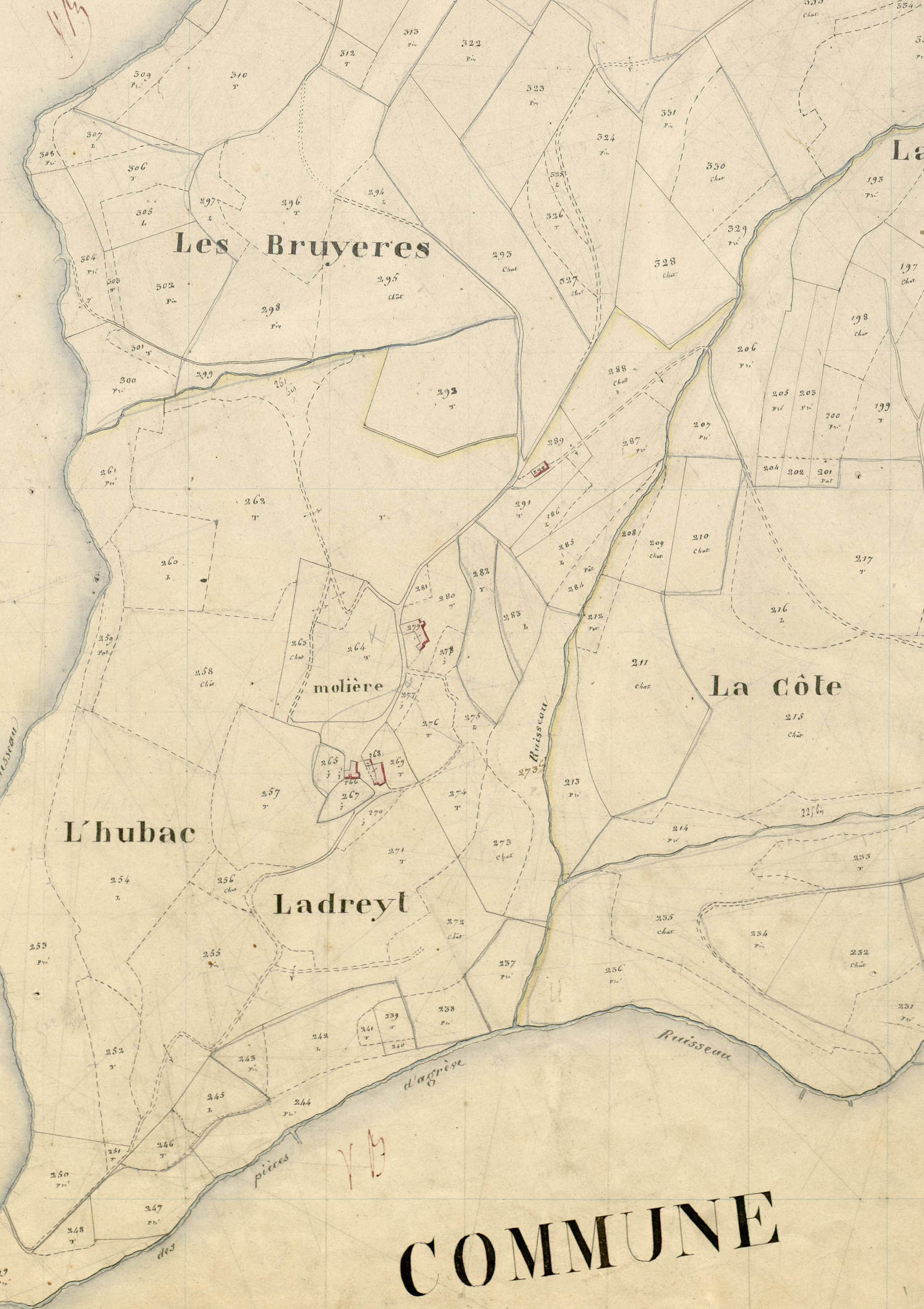 Molière (commune de Pailharès) en Ardèche, état en 1837, soit avant le développement du hameau et de son église. Archives départementales de l'Ardèche, E 3P 2810-12, cadastre napoléonien 1837